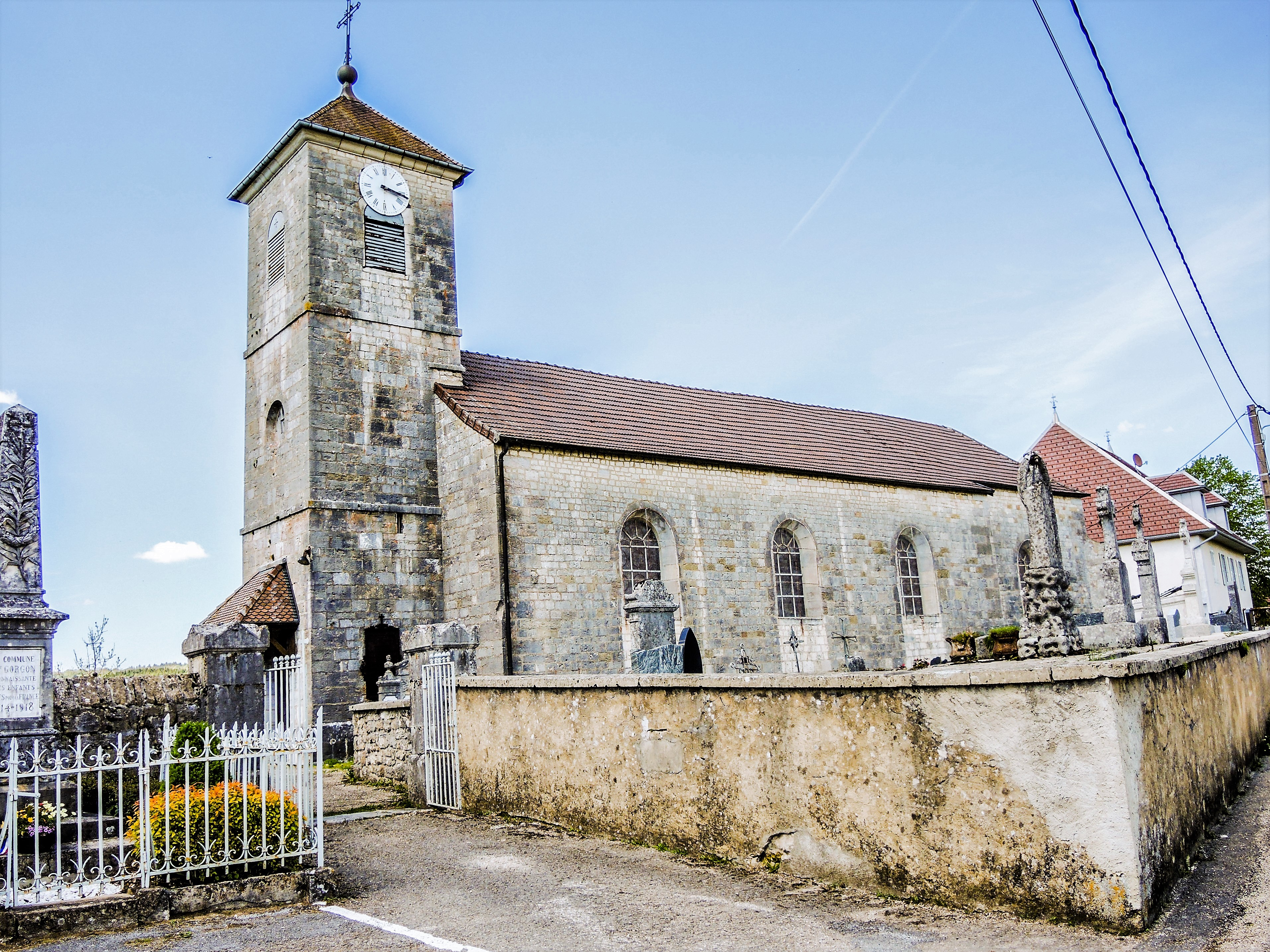 Eglise